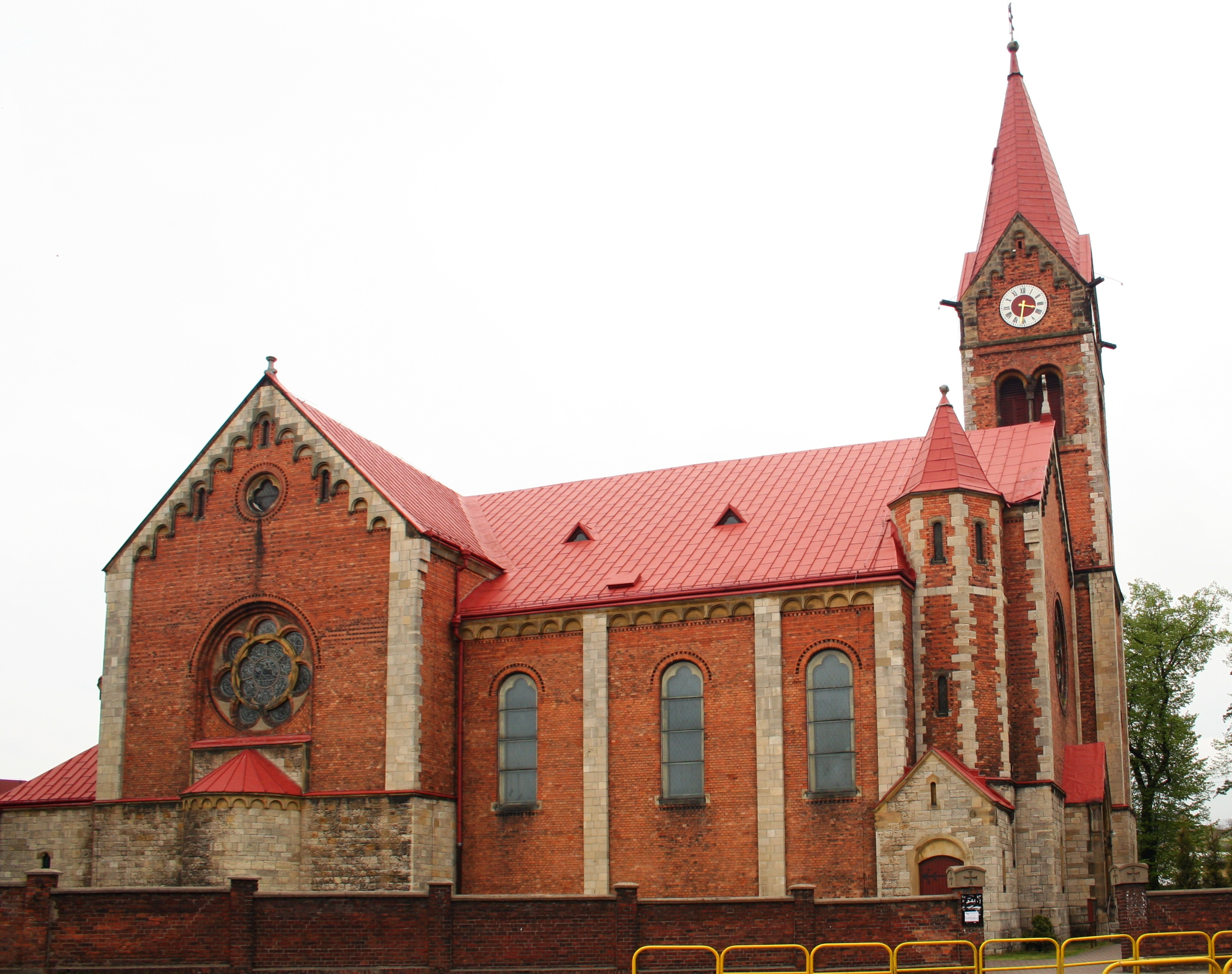 Kościół św. Marcina i Wyznawcy w Starych Tarnowicach (Tarnowskie Góry), Polska, województwo śląskie